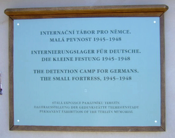 Inschrift im Hof IV. in der Kleinen Festung Theresienstadt, die auf das „Internierungslager der Kleinen Festung Theresienstadt“ hinweist Aufnahme: 1. Juli 2006 Url